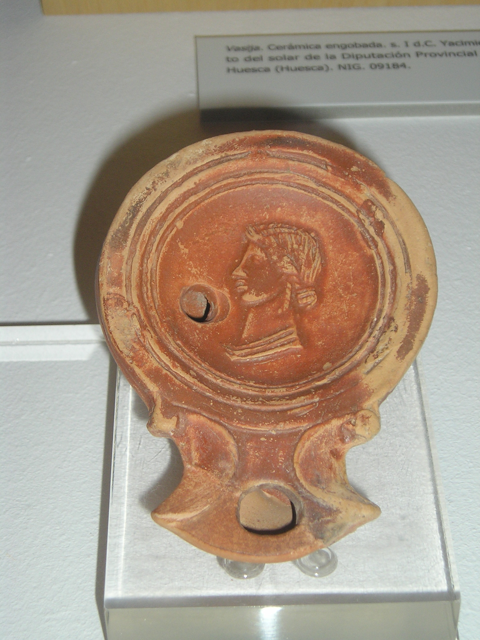 Lucerna romana del siglo I procedente de excavación arqueológica en Huesca, antiguo Municipium Vrbs Victrix Osca, con un retrato femenino